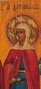 Фотина Самаряныня (деталь иконы "Избранные святые", Россия, XIX век. Дерево, темпера. 27 x 22 см. Частное собрание)